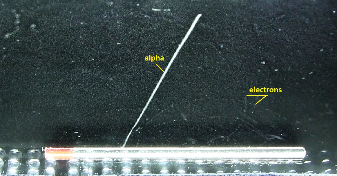 Cette tige à souder contient 2% de Thorium 232 comme indiqué par le bout rouge de la baguette ce qui représente 0.23 g. L’ajout de Thorium permet d’augmenter l’intensité du courant et de stabiliser l’arc de soudure. Cette tige est communément utiliser dans l’industrie (soudage TIG). Au niveau de la radioprotection, souder avec ces baguettes n’est pas recommandé car le Thorium se retrouve dispersé dans l’air, que les intervenants peuvent respirer. Le Thorium 232, unique isotope naturel du Thorium, à une demie-vie de 14 milliards d’années. Les particules que l’on voient dans la chambre à brouillard proviennent de sa désintégration et de ses noyaux fils